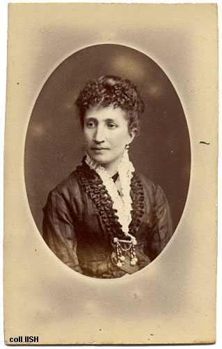 Marie Ferré (1852-1882)